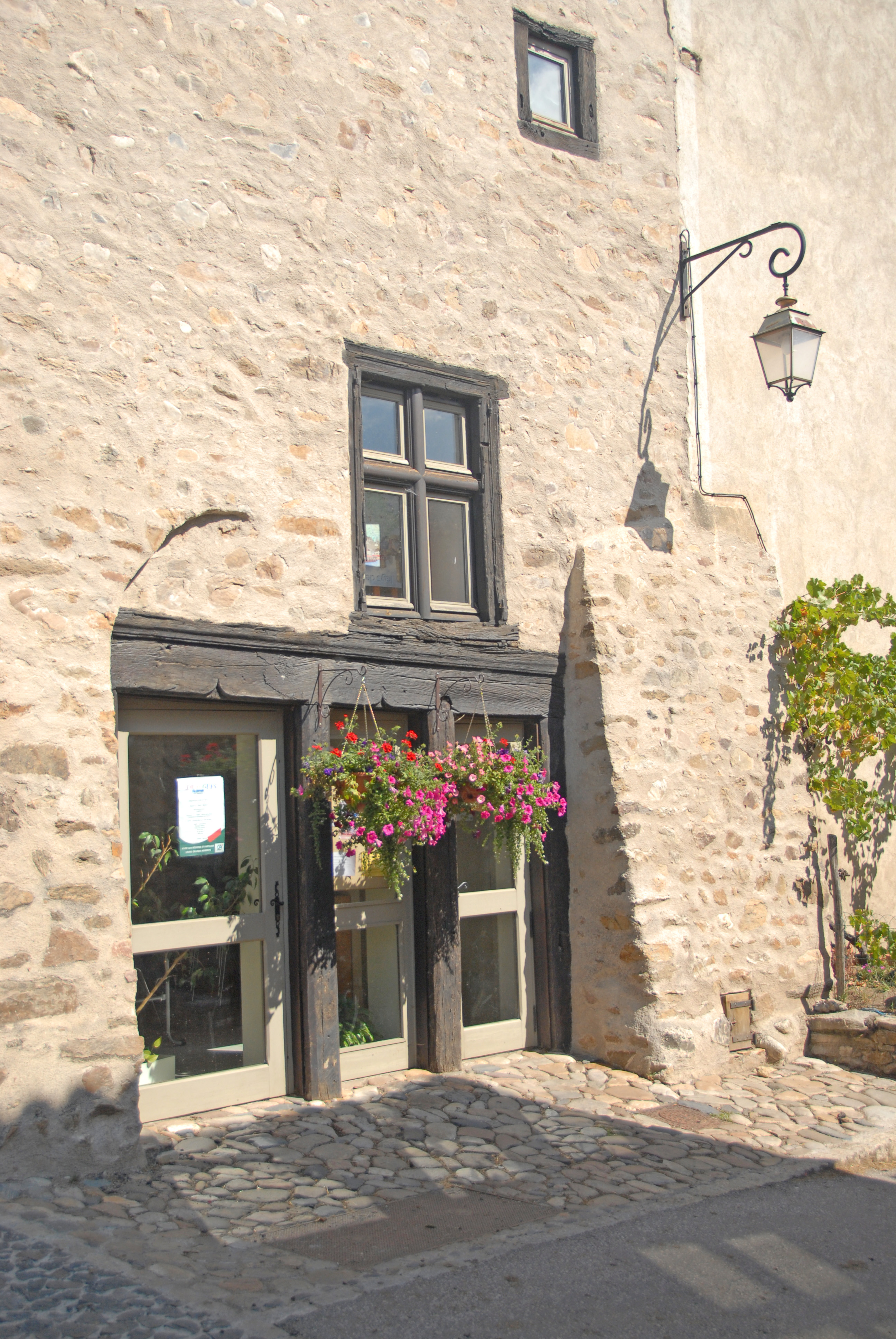 Lavaudieu, Laden am Dorfplatz